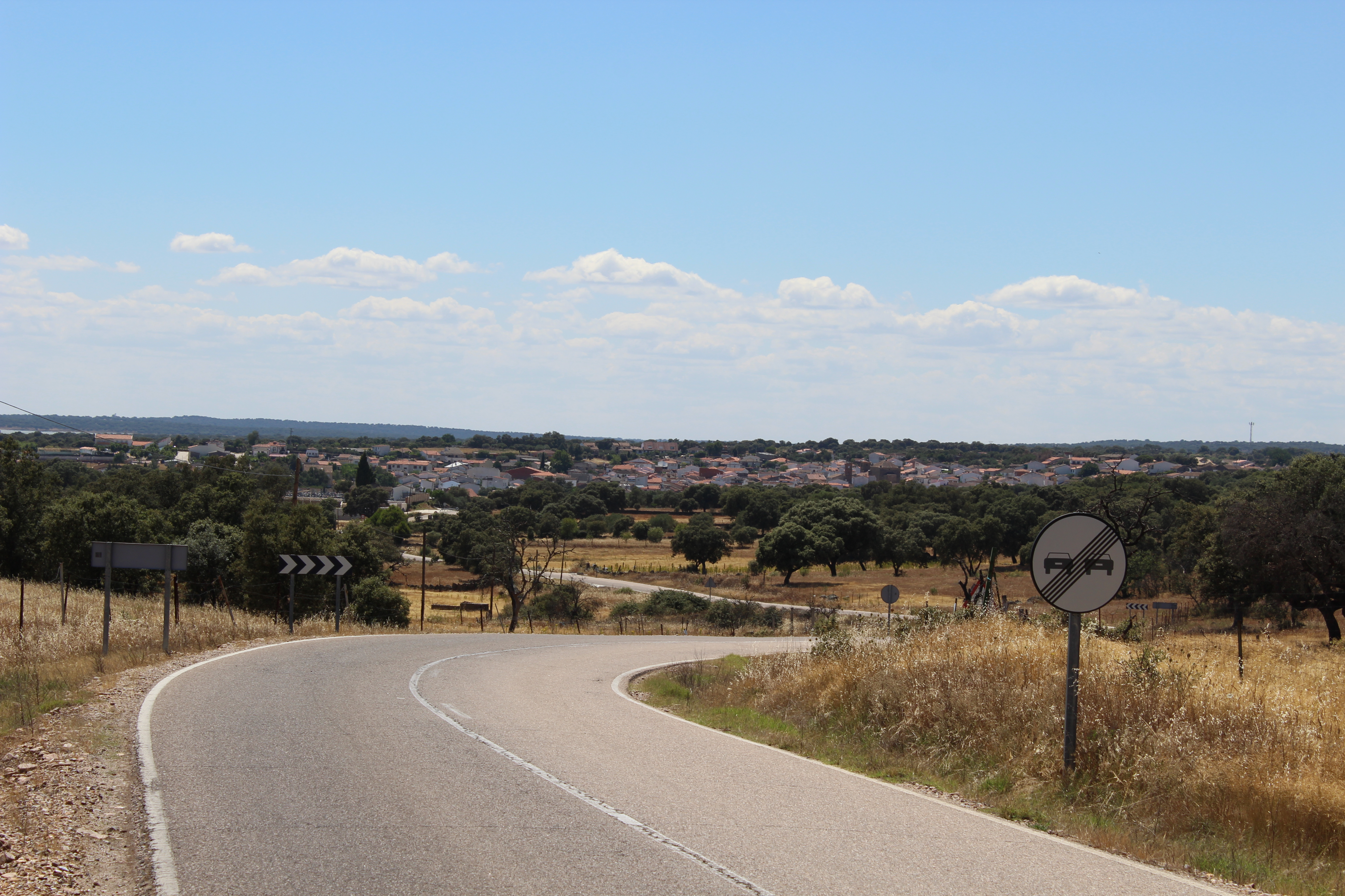 Vista de Parrillas, Toledo.